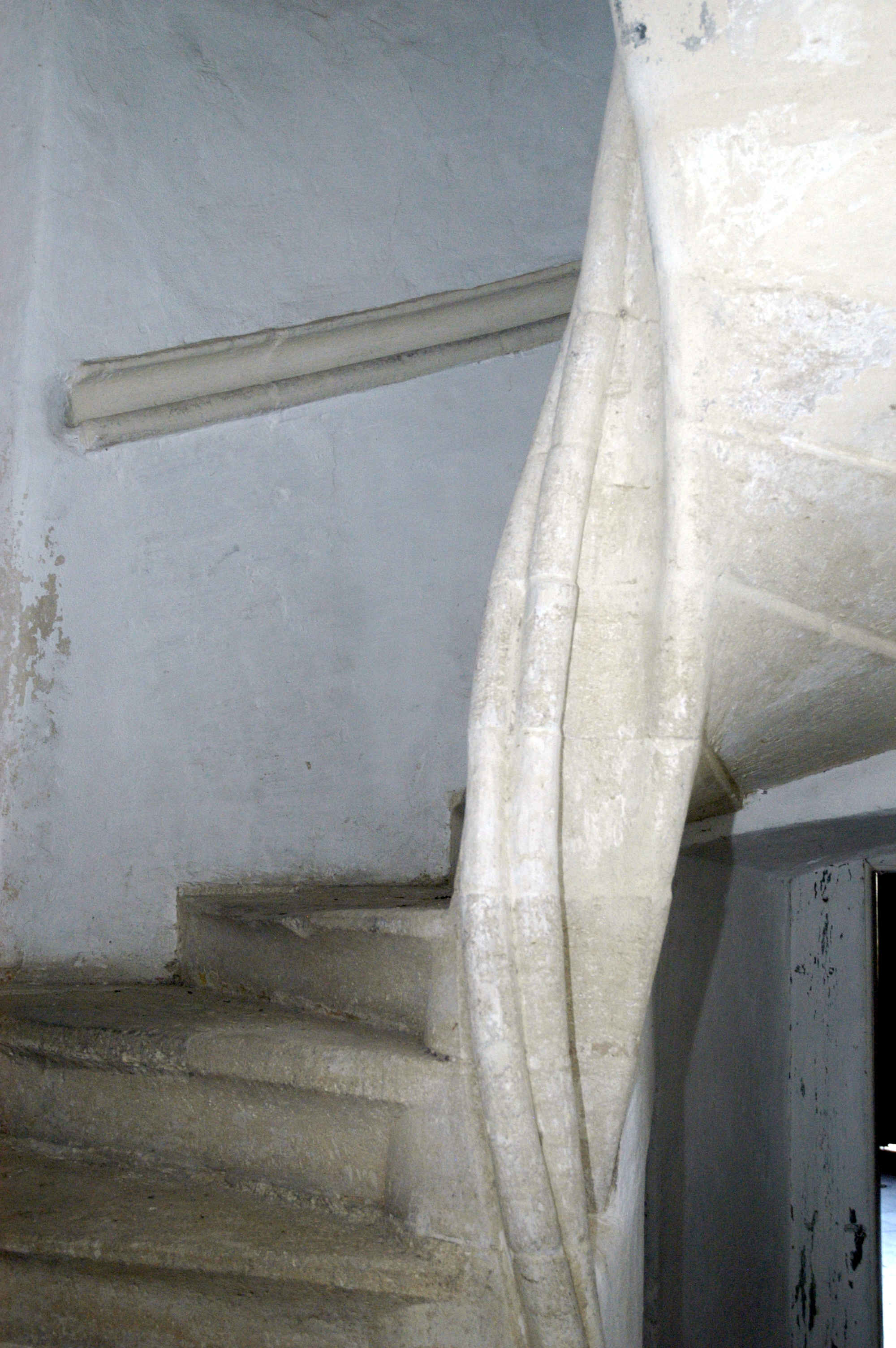 Schloss Schrattenthal Wendeltreppe